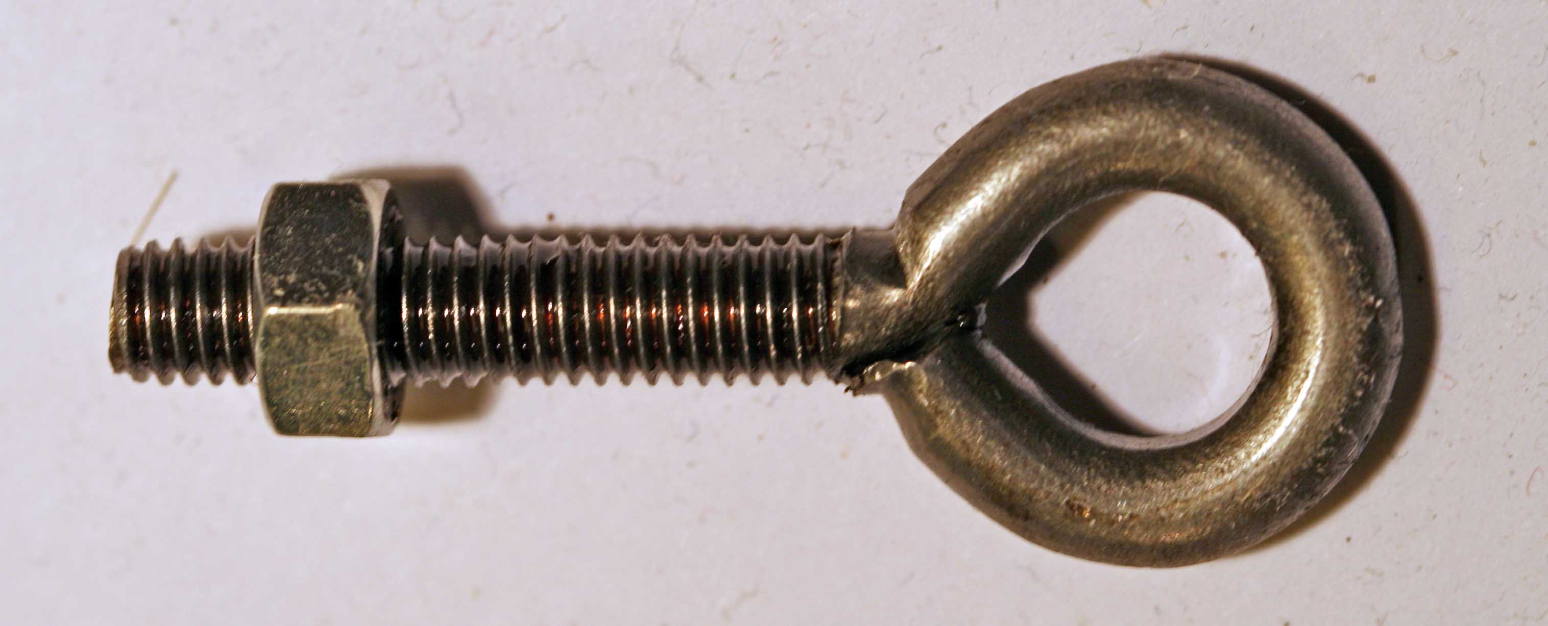 RAN GEW.